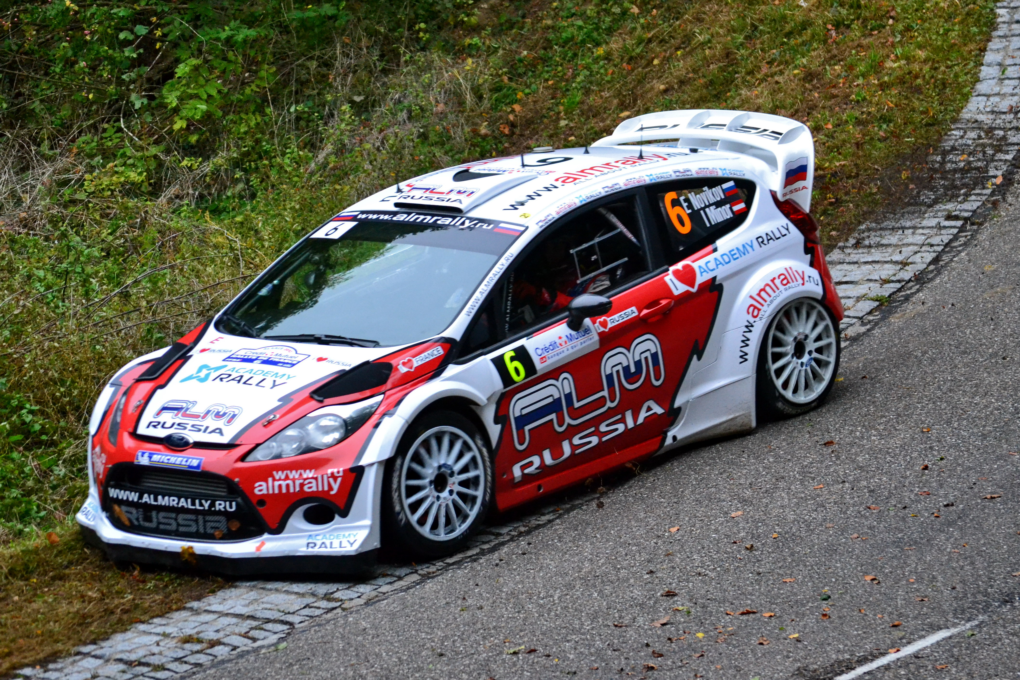 Rallye WRC France-Alsace 2012, ES2 Hohlandsbourg-Firstplan 1. Ford Fiesta RS WRC - Evgeny Novikov/Ilka Minor